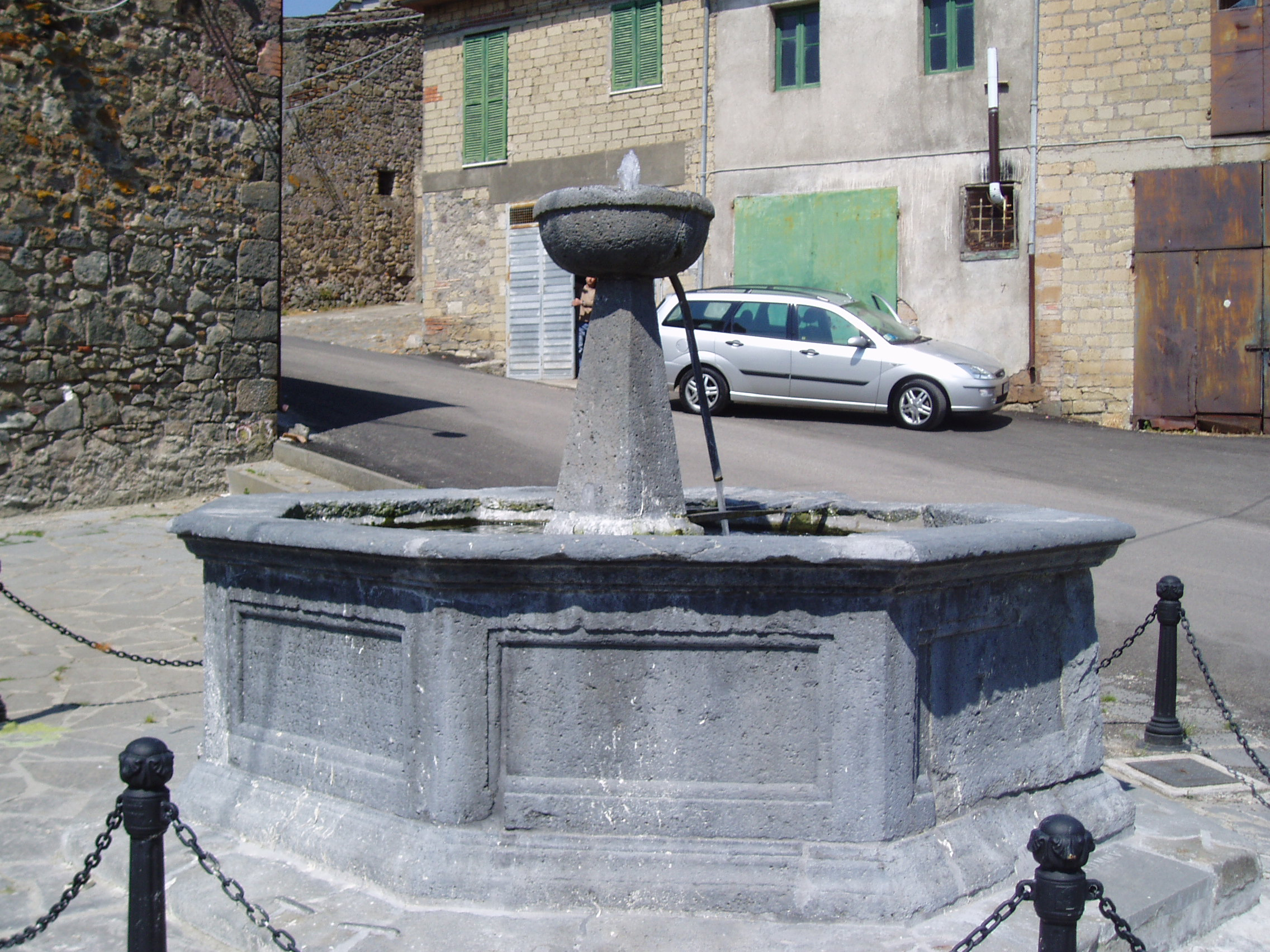 Fontana Ducale in Latera, (VT), Italy